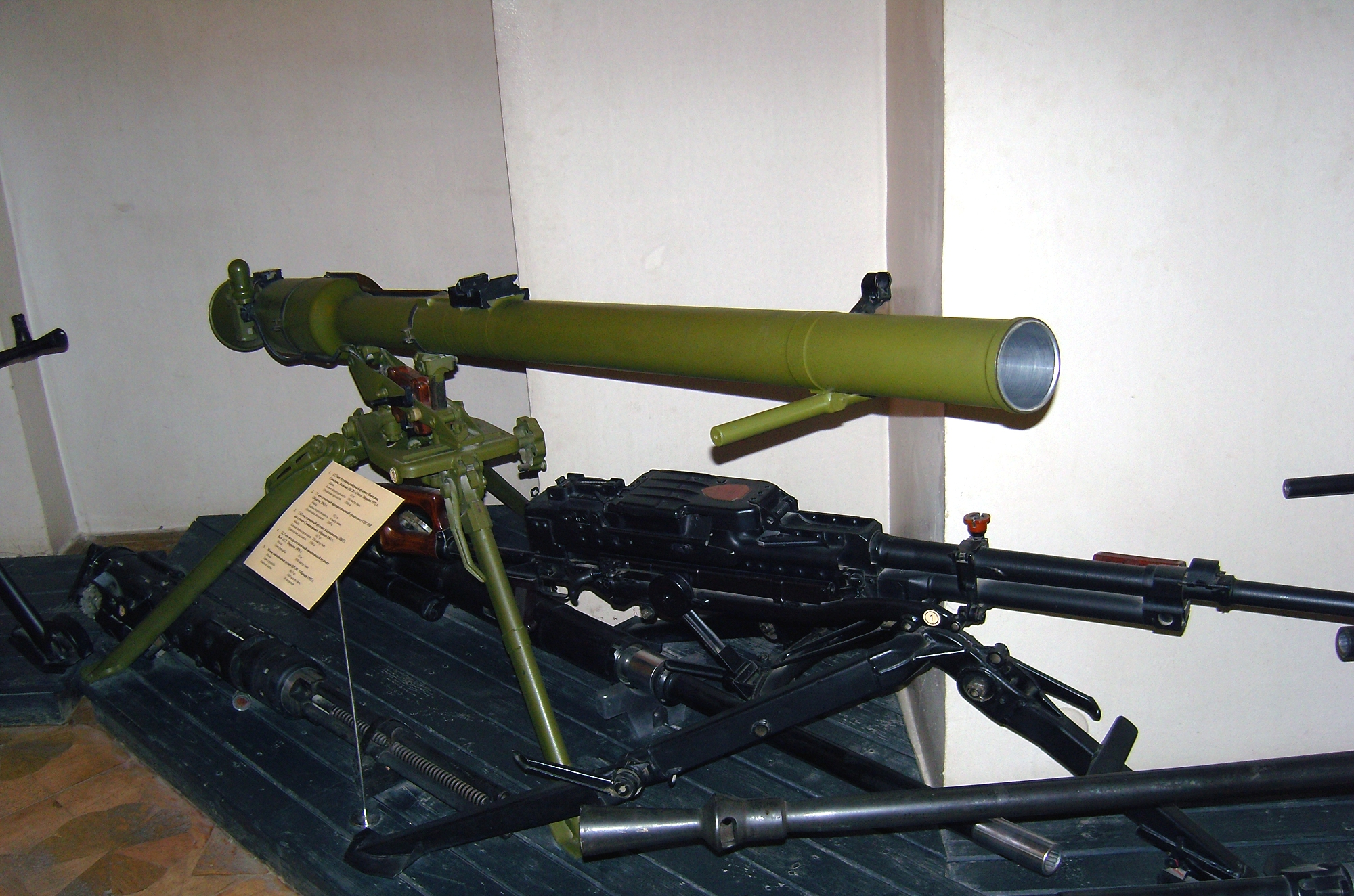 НСВ Утёс и СПГ-9М (NSV Utes and SPG-9M)